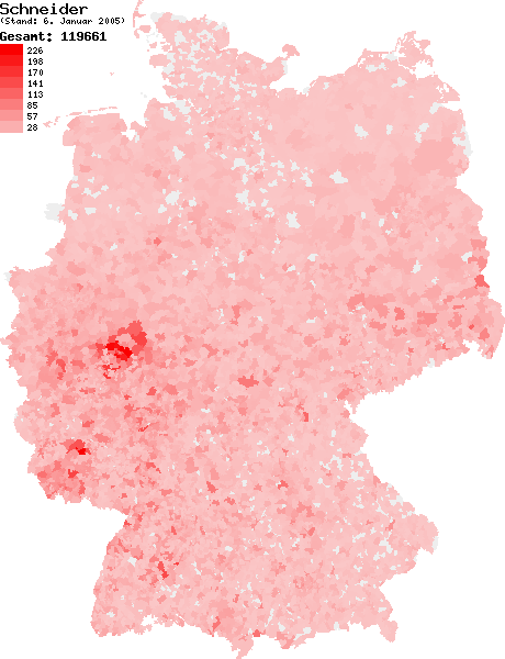 Verteilung des Nachnamens Schneider in Deutschland nach dem Telefonbuch mit Stand vom 6. Januar 2005 Source: selbst erstellt Ersteller: W. Baumgartner